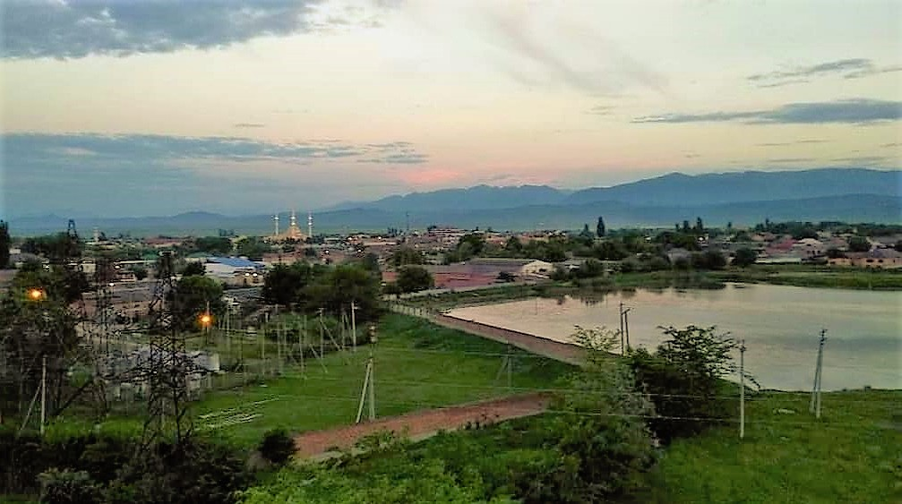 В селе Ачхой Мартан